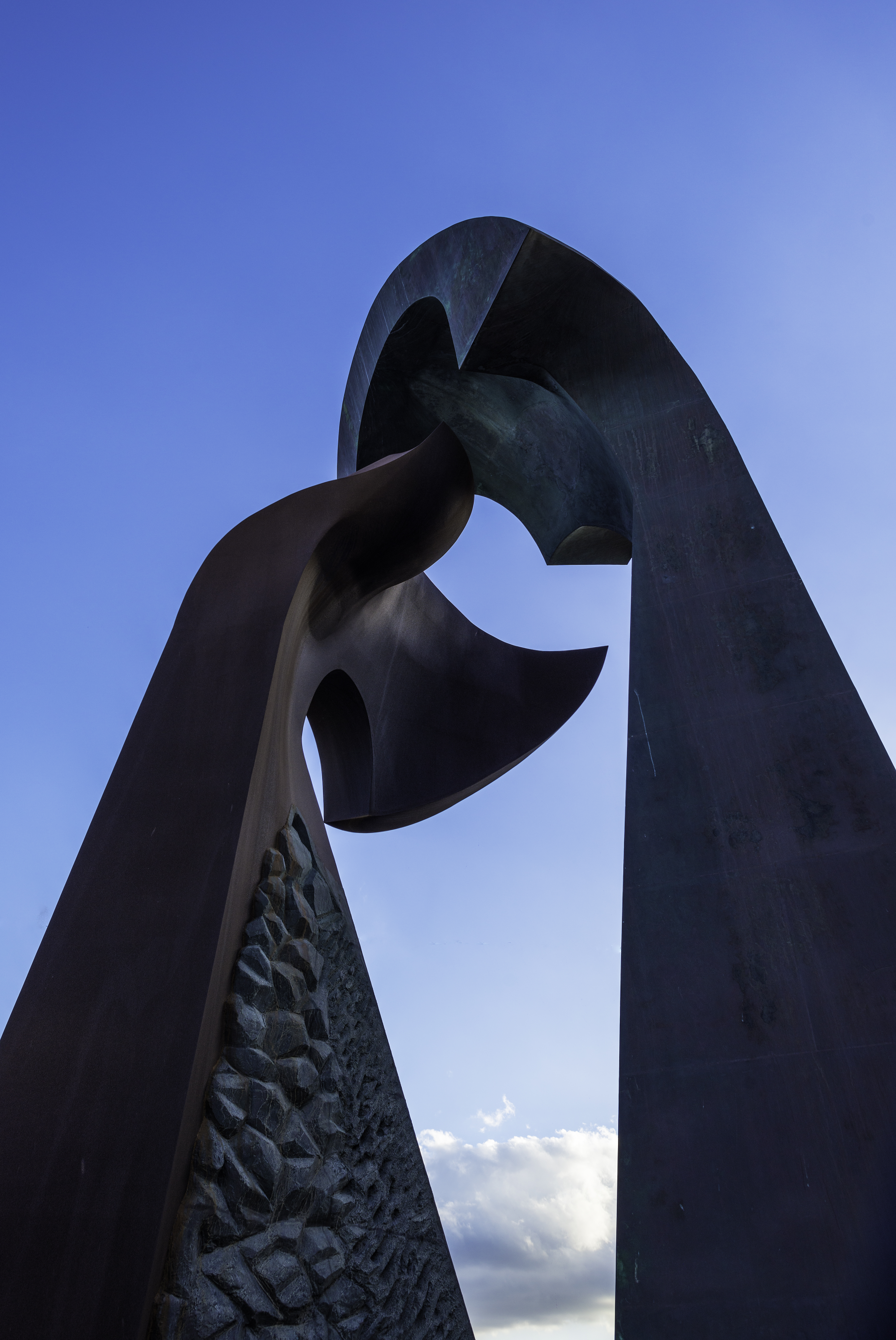 Escultura de Mustafa Arruf titulada "Encuentros". Melilla 1997.